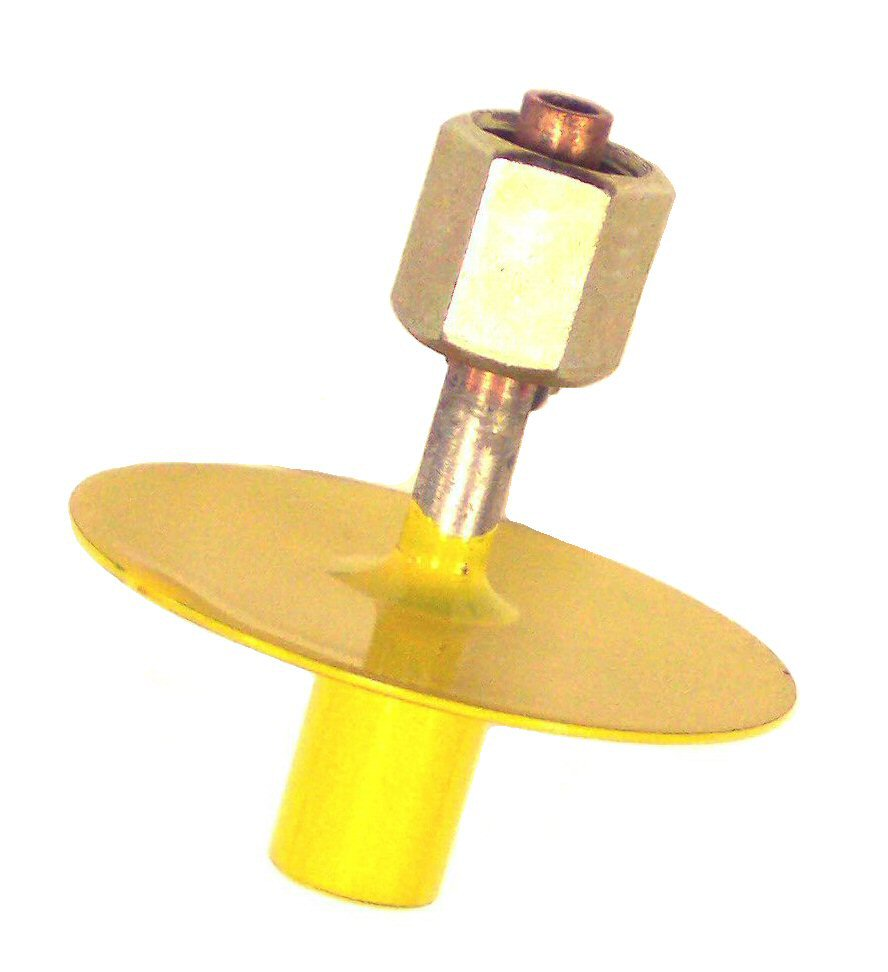 Pneumatic release element of a fire extinguishing system responding at 72 °C / Bei 72 °C reagierendes Pneumatisches Auslöseelement für eine Feuerlöschanlage